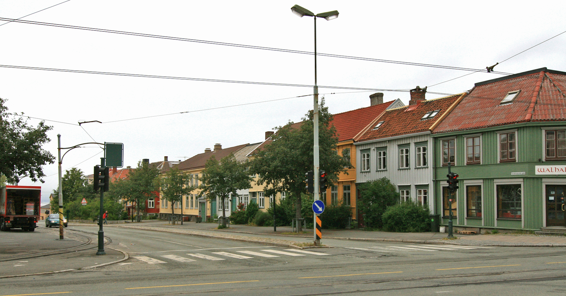 Tordenskiolds gate, Trondheim.